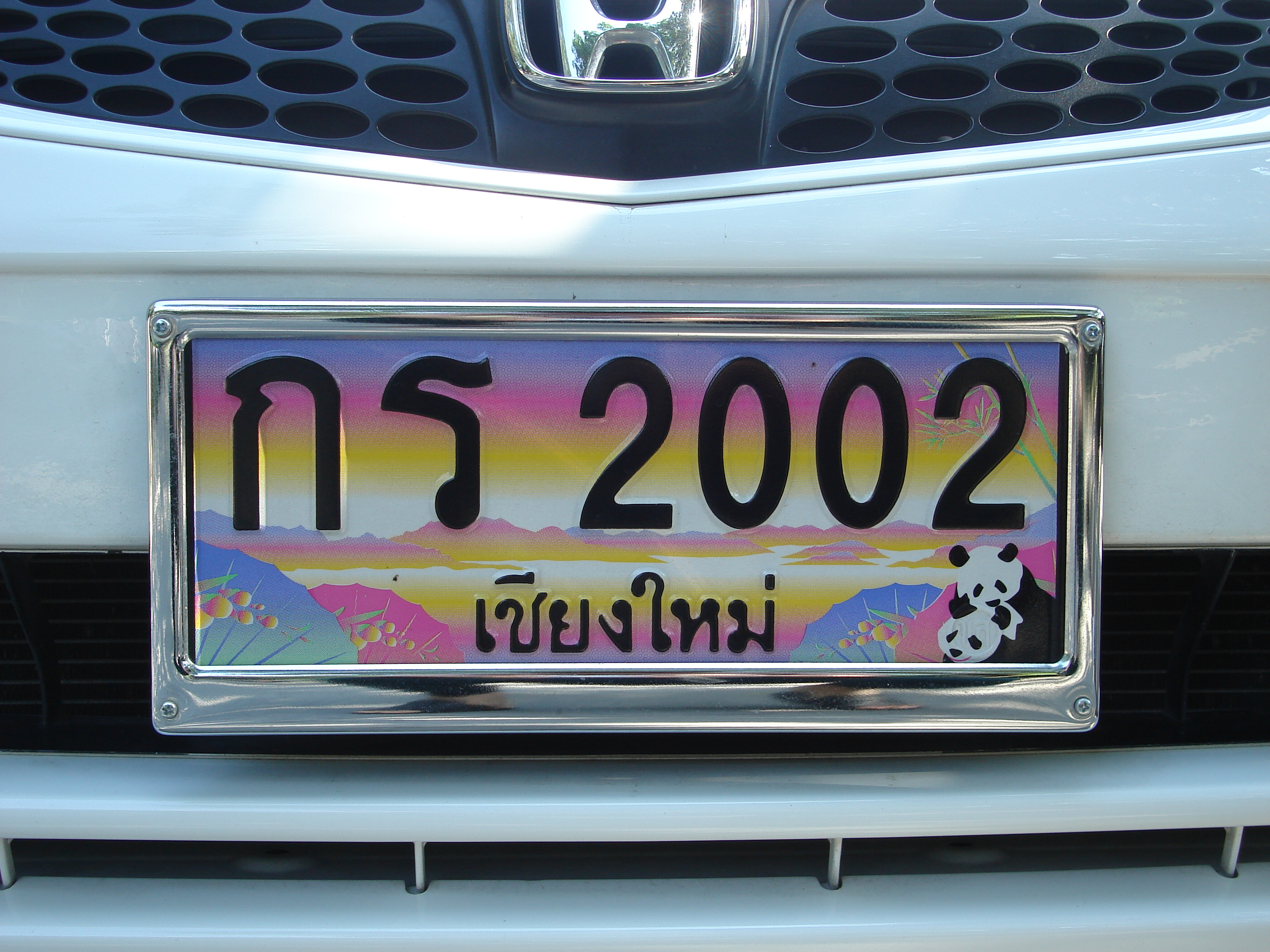 หนึ่งในหลายป้ายทะเบียนเลขสวย ที่สำนักงานขนส่งจังหวัดเชียงใหม่จัดการประมูล (auctioned plate from Chiangmai, Thailand) (ไม่ใช่ป้ายของข้าพเจ้า - ไม่ทราบเจ้าของ - This is not my plates.) เป็นป้ายทะเบียนที่มีรูปภาพหมีแพนด้า ร่มบ่อสร้าง และทะเลหมอกห้วยน้ำดัง